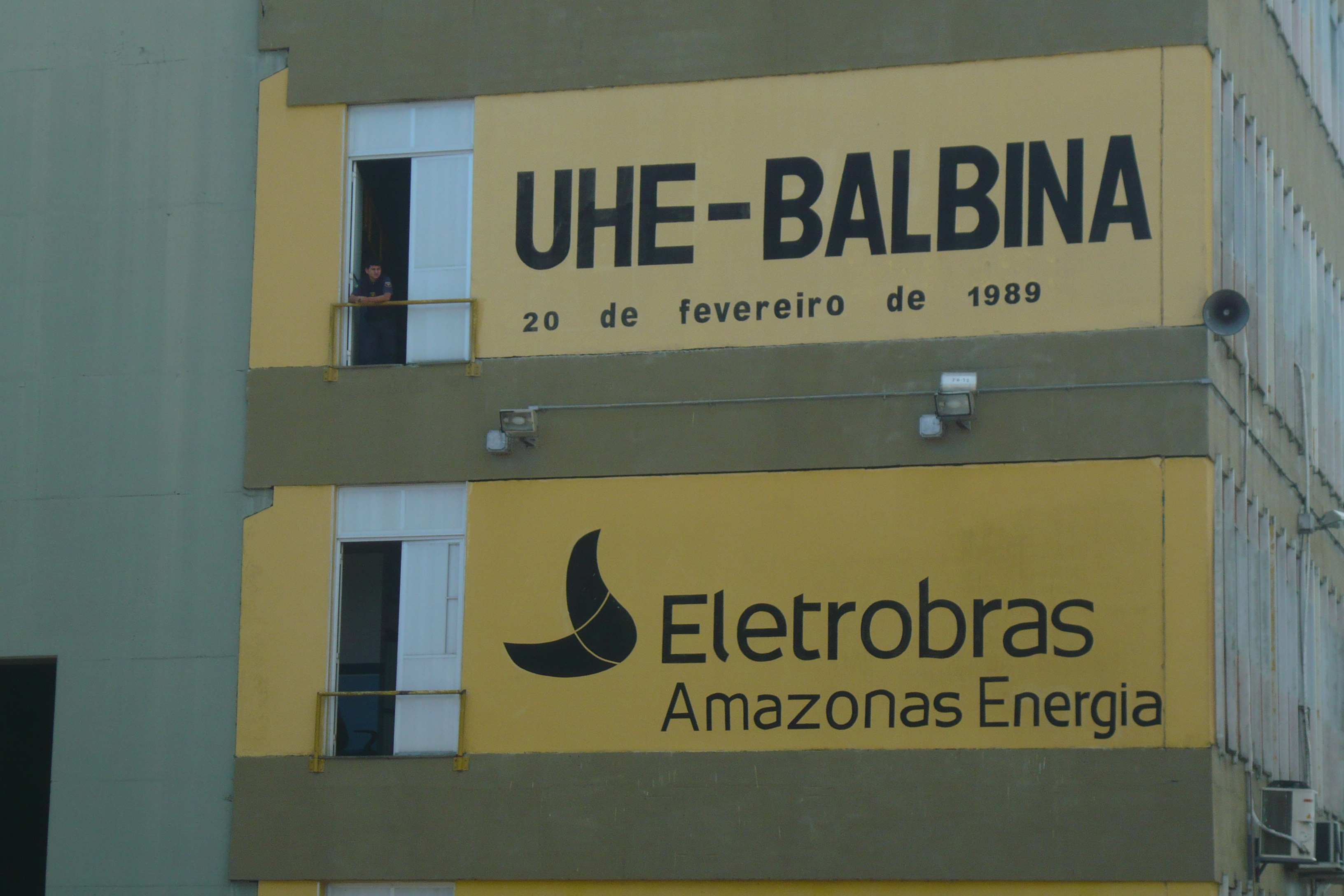 entrada da uhe de balbina